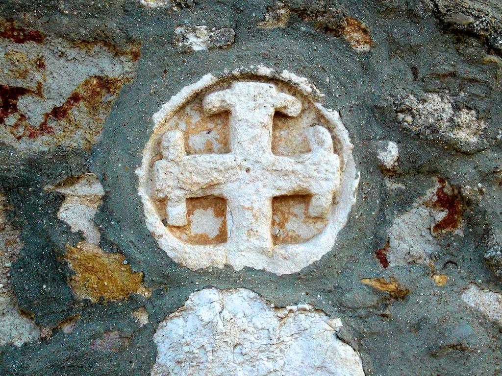 Cruz que marca el lugar donde la tradición dice que el perjuro sitiador rey castellano fue atravesado por el venablo de Bellido Dolfos en el Campo de la Verdad de Zamora